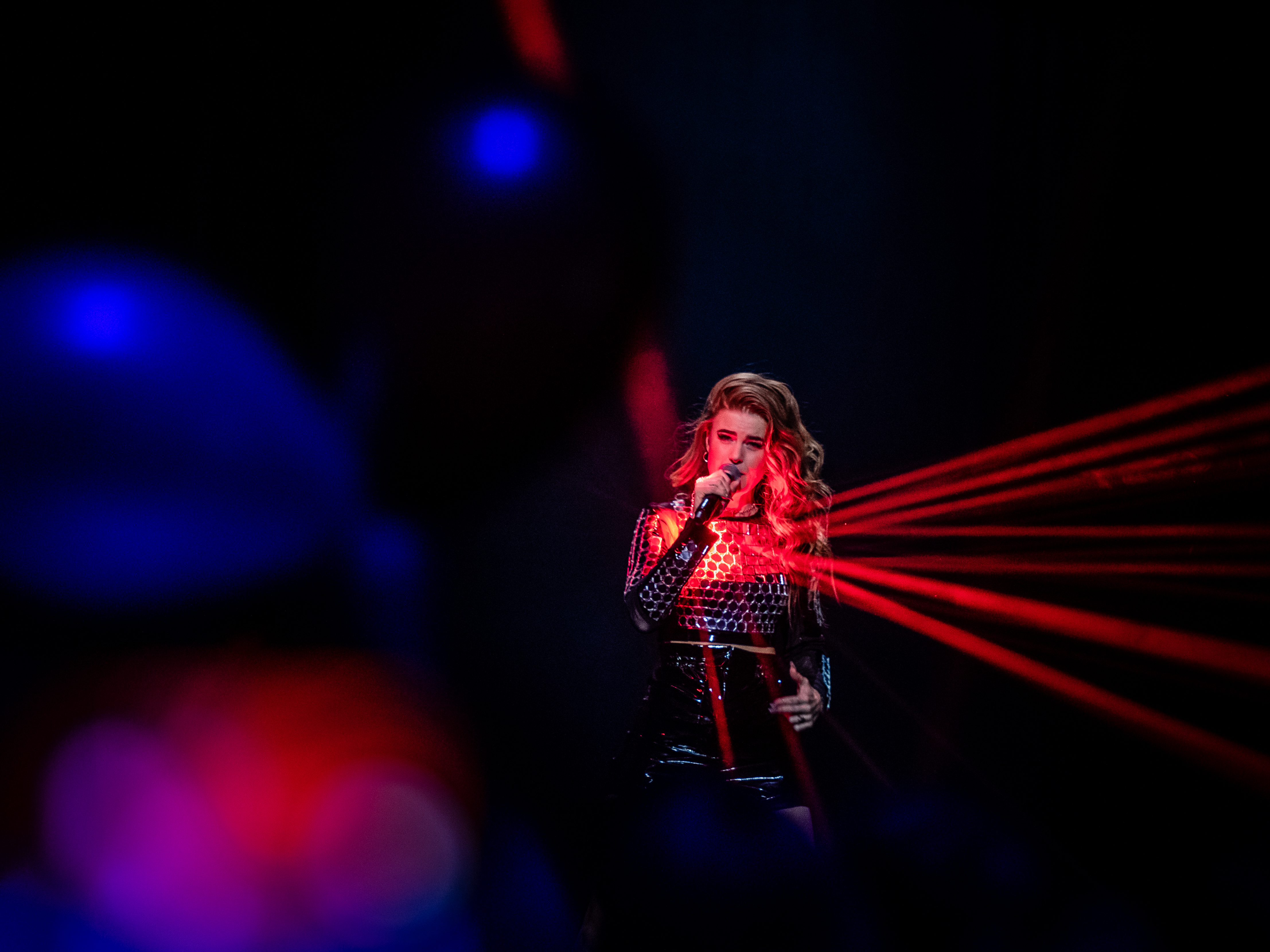 Artisten Dotter sjunger sitt bidrag "Bulletproof" på scen i finalen i Melodifestivalen 2020